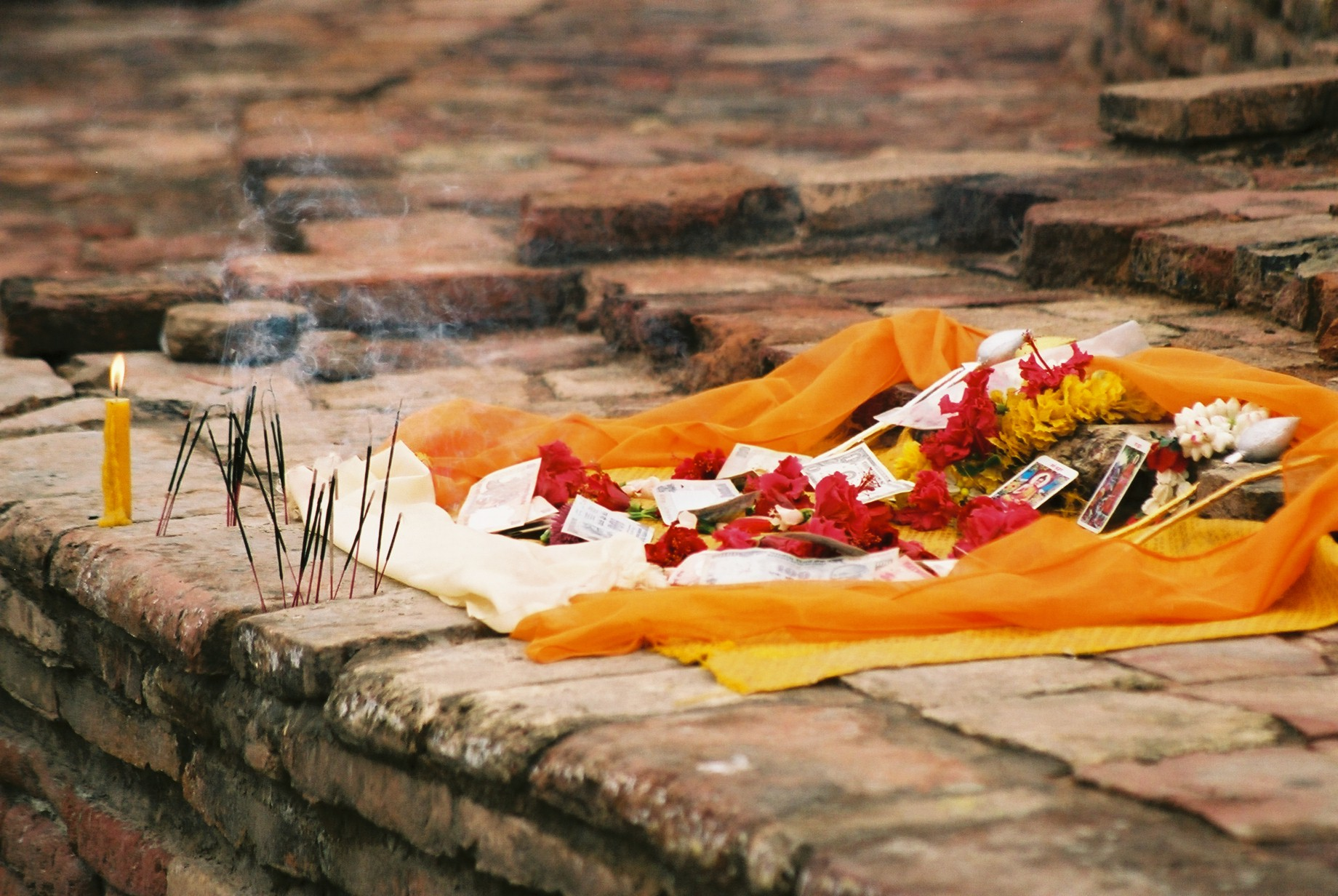 アーナンダ・ストゥーパに設けられた祭壇。 (2005/01/24 Vaishali, Bihar, INDIA)